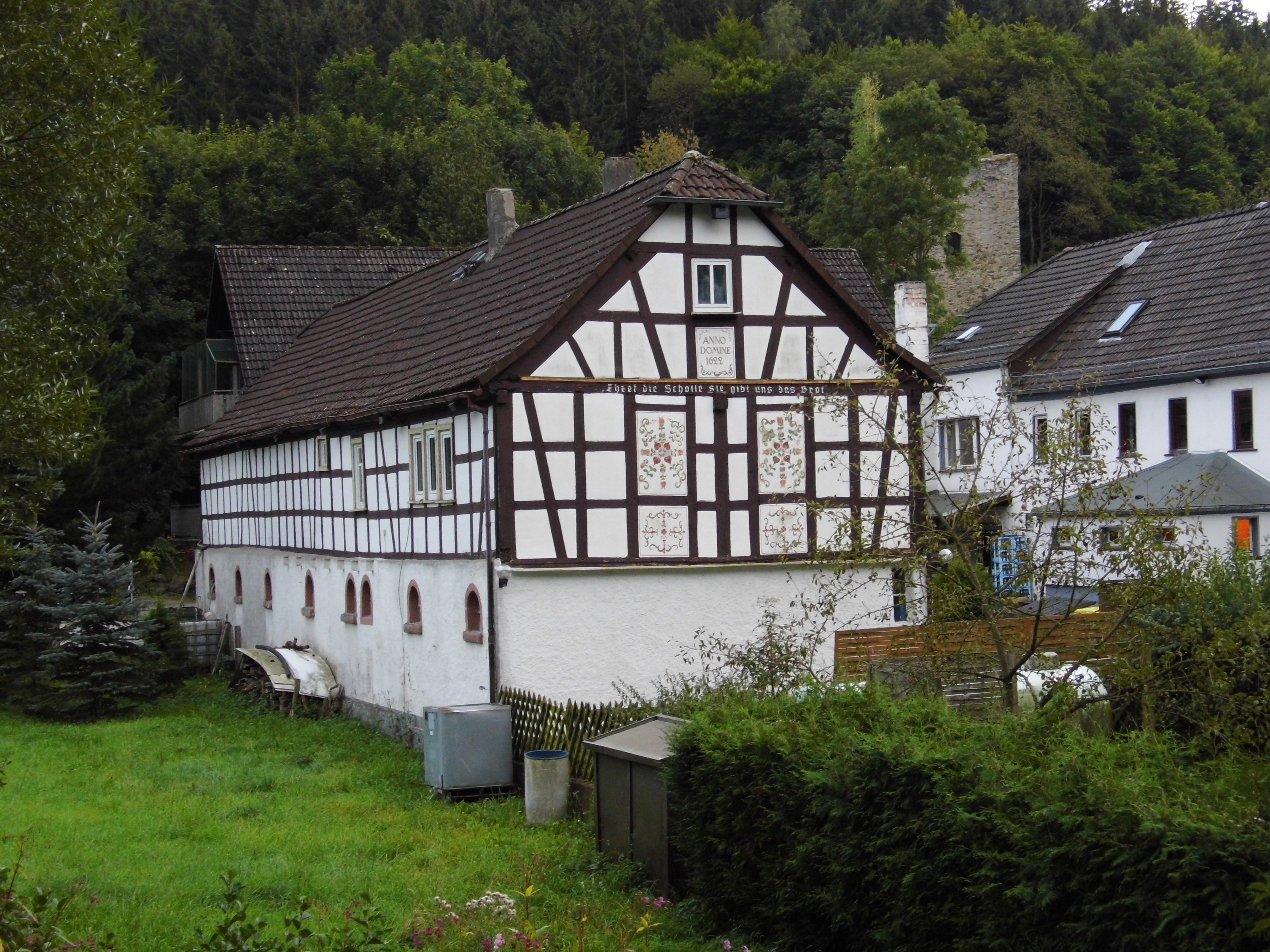 Landsteiner Mühle, Fachwerkgebäude